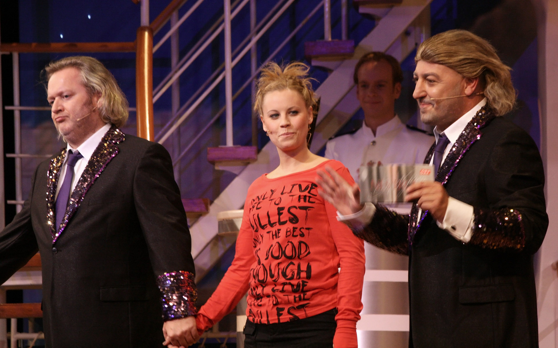 Katharina Straßer, Gregor Seberg und Rudi Roubinek, Moderation der Verleihung des Nestroy-Theaterpreises 2011 im Raimund Theater in Wien.